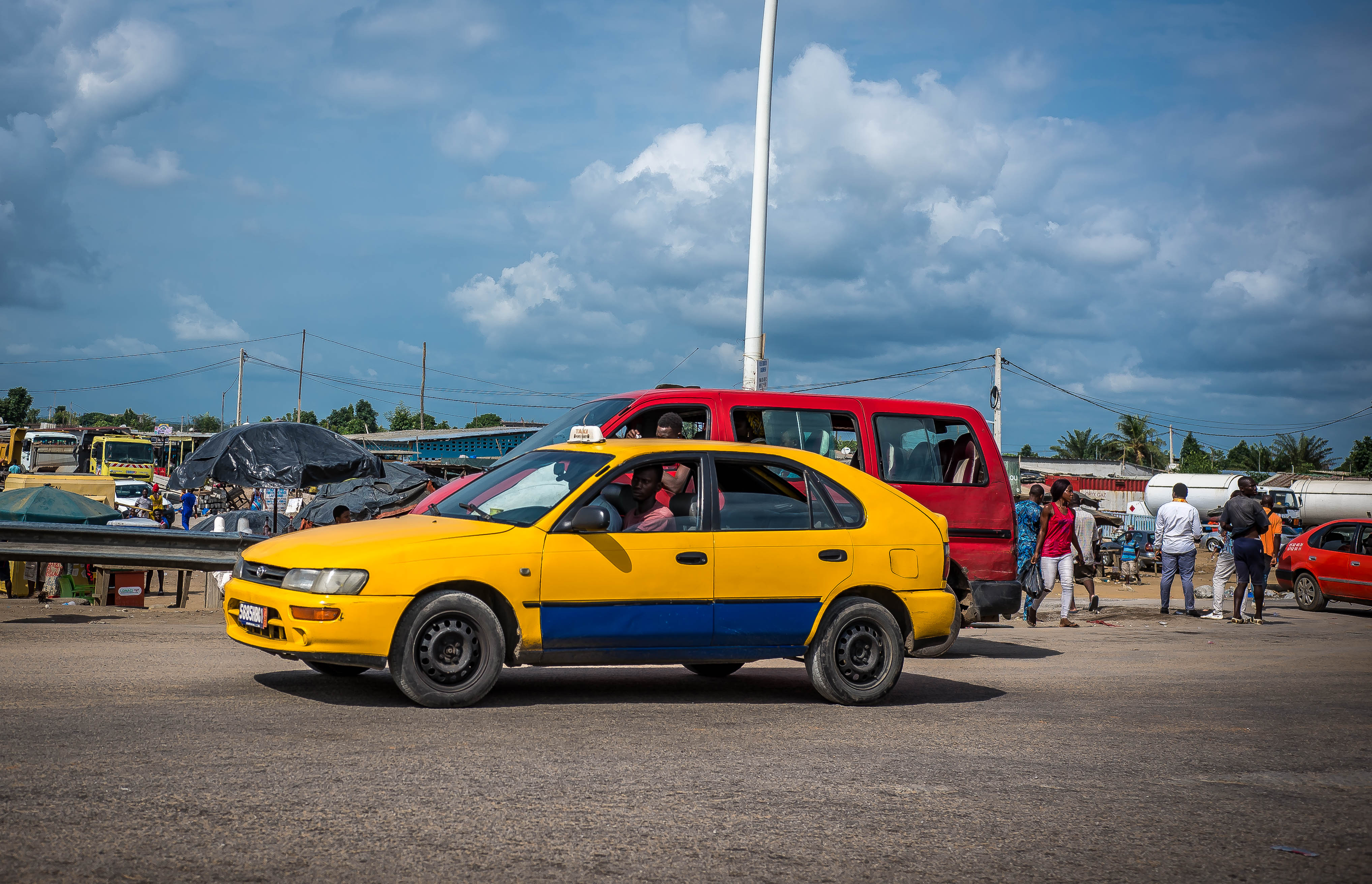 Wôrô wôrô moyen de transport, qui assure au quotidien le déplacement des personnes,des biens et des marchandises This is an image with the theme "Africa on the Move or Transport" from: Ivory Coast